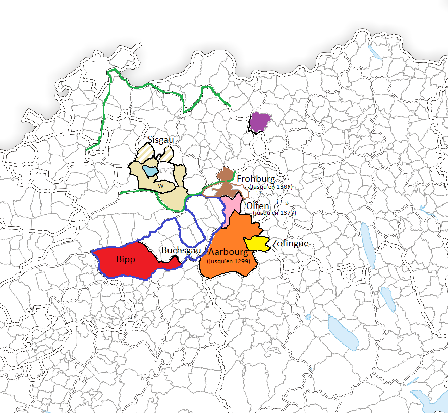 Carte des possessions de la famille de Frobourg.